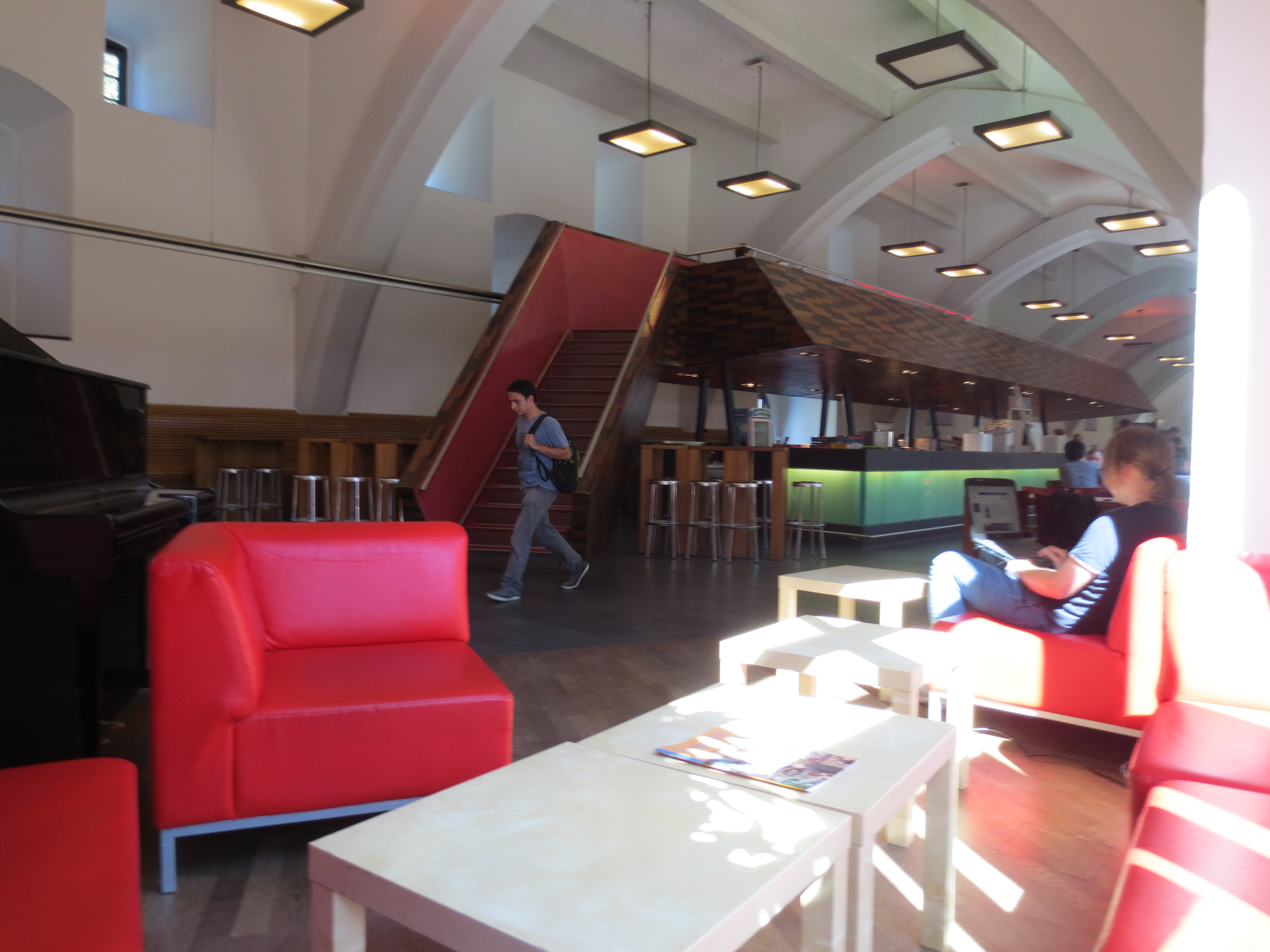 Früh am Morgen Lounge in der Mensa, Marstall